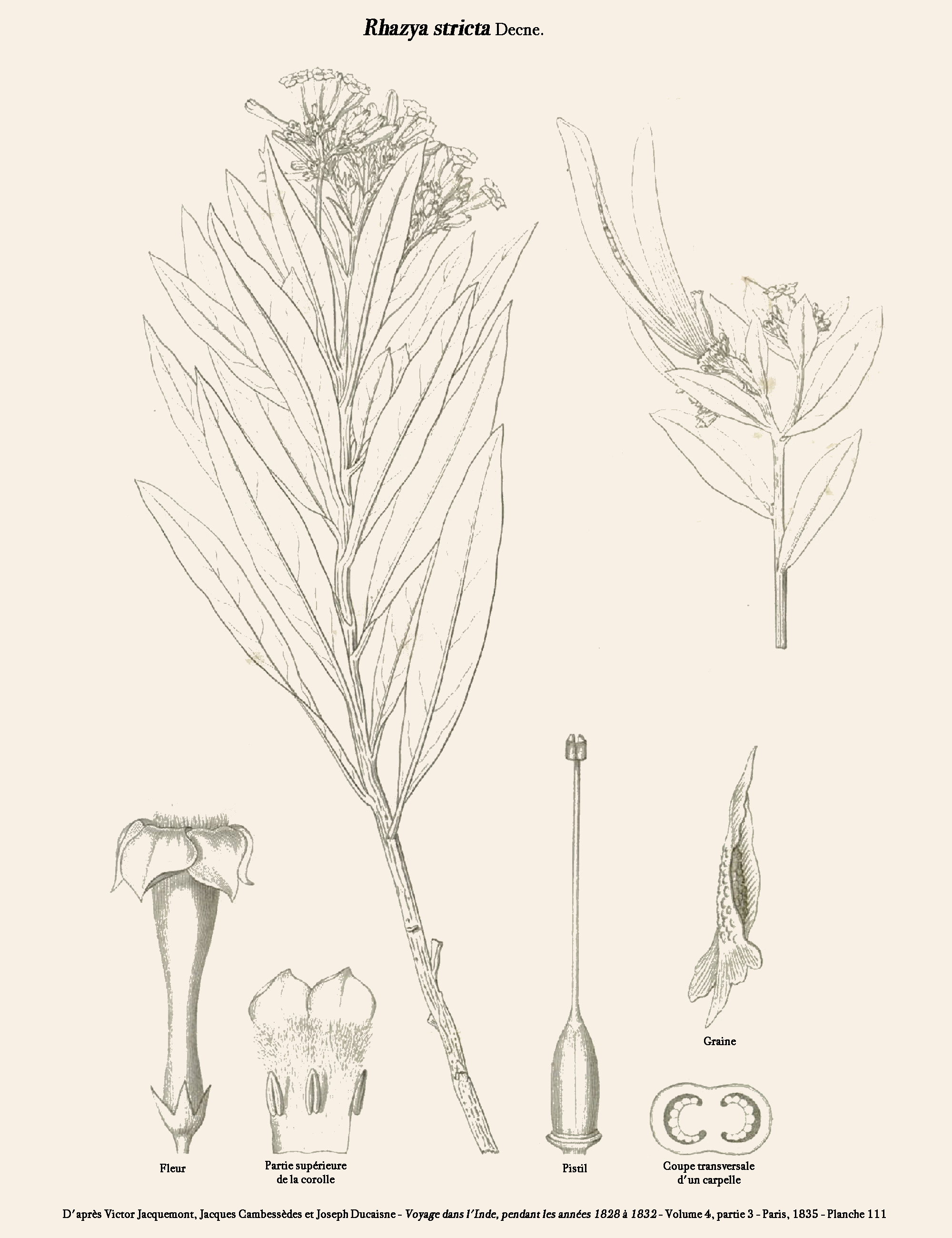 Rhazya stricta - d'après Victor Jacquemont, Jacques Cambessèdes et Joseph Decaisne - Voyage dans l'Inde, pendant les années 1828 à 1832 - Volume 4, partie 3 - Paris, 1835 - planche 111